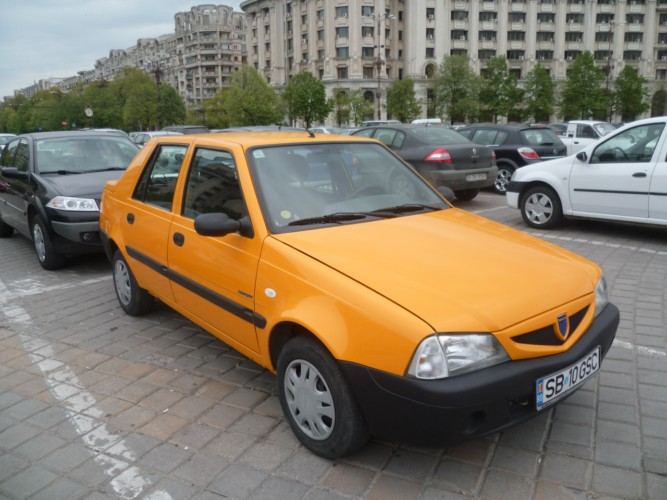 Dacia Solenza photographiée à Bucarest.